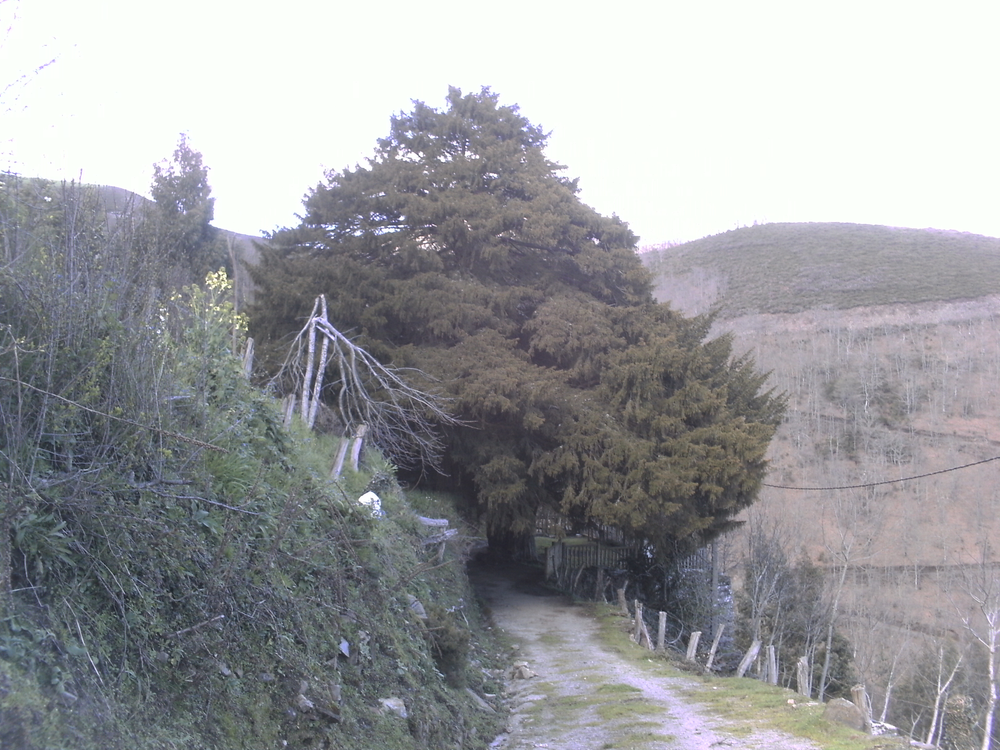 Texu de Santa Colomba (Ayande)